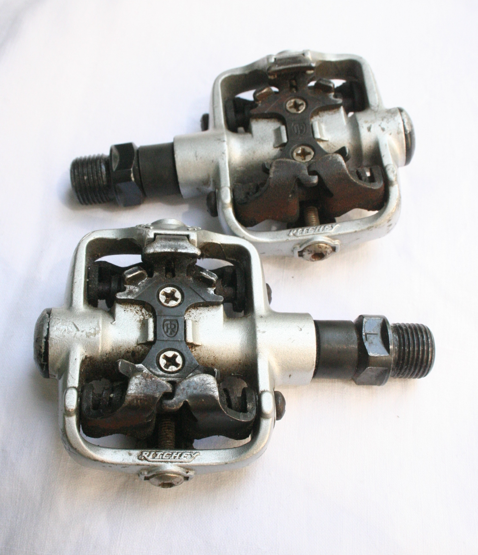 Ritchey SPD pedals